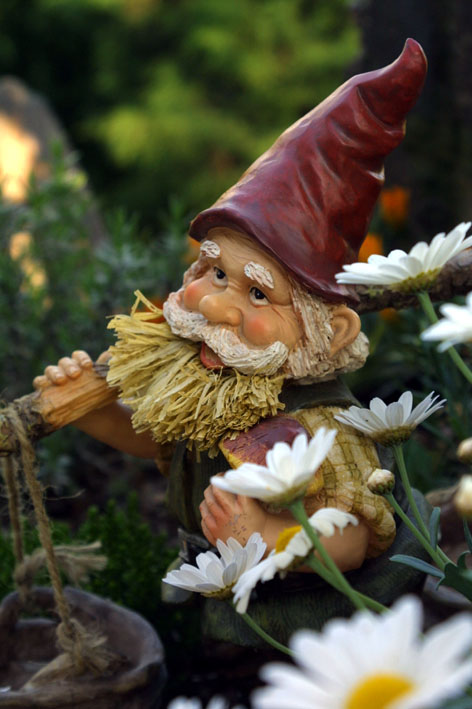 Gartenzweg